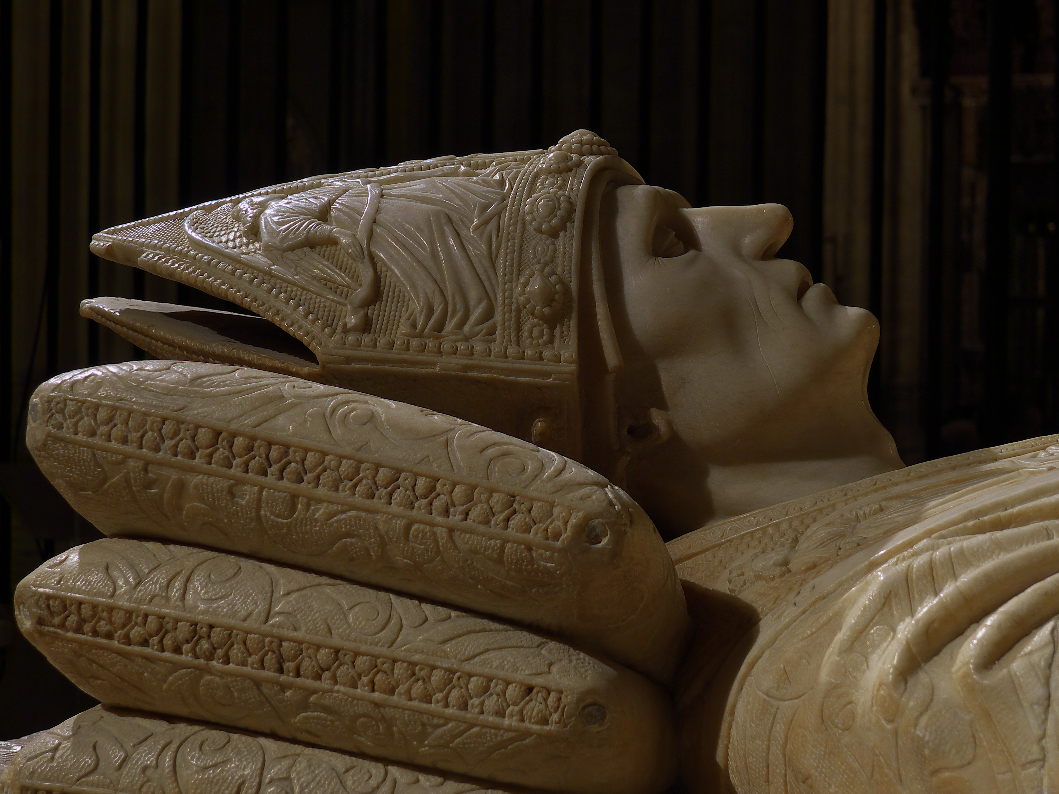 Capilla de San Hermenegildo (Catedral de Sevilla). Detalle del monumento. El bretón, Lorenzo Mercadante de Bretaña esculpe (1458), magistralmente, el sepulcro en alabastro del Cardenal Cervantes (†25 de Noviembre de 1453), siendo Maestro Mayor de la fábrica, Juan Normant.